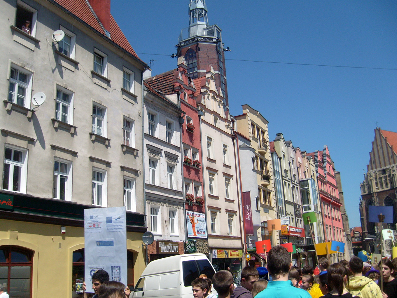 Część z ocalałych kamienic, dalej kamienice odbudowane.